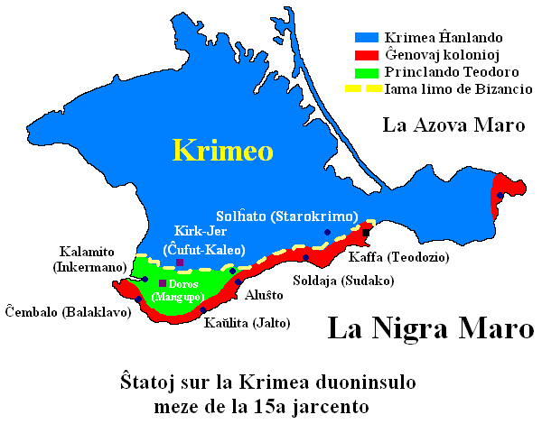 Politikaj strukturoj sur la Krimea duoninsulo meze de la 15a jarcento. La dosiero estas E-adapto de libera dosiero el la ruslingva vikipedio Kategorio:Historio de Krimeo